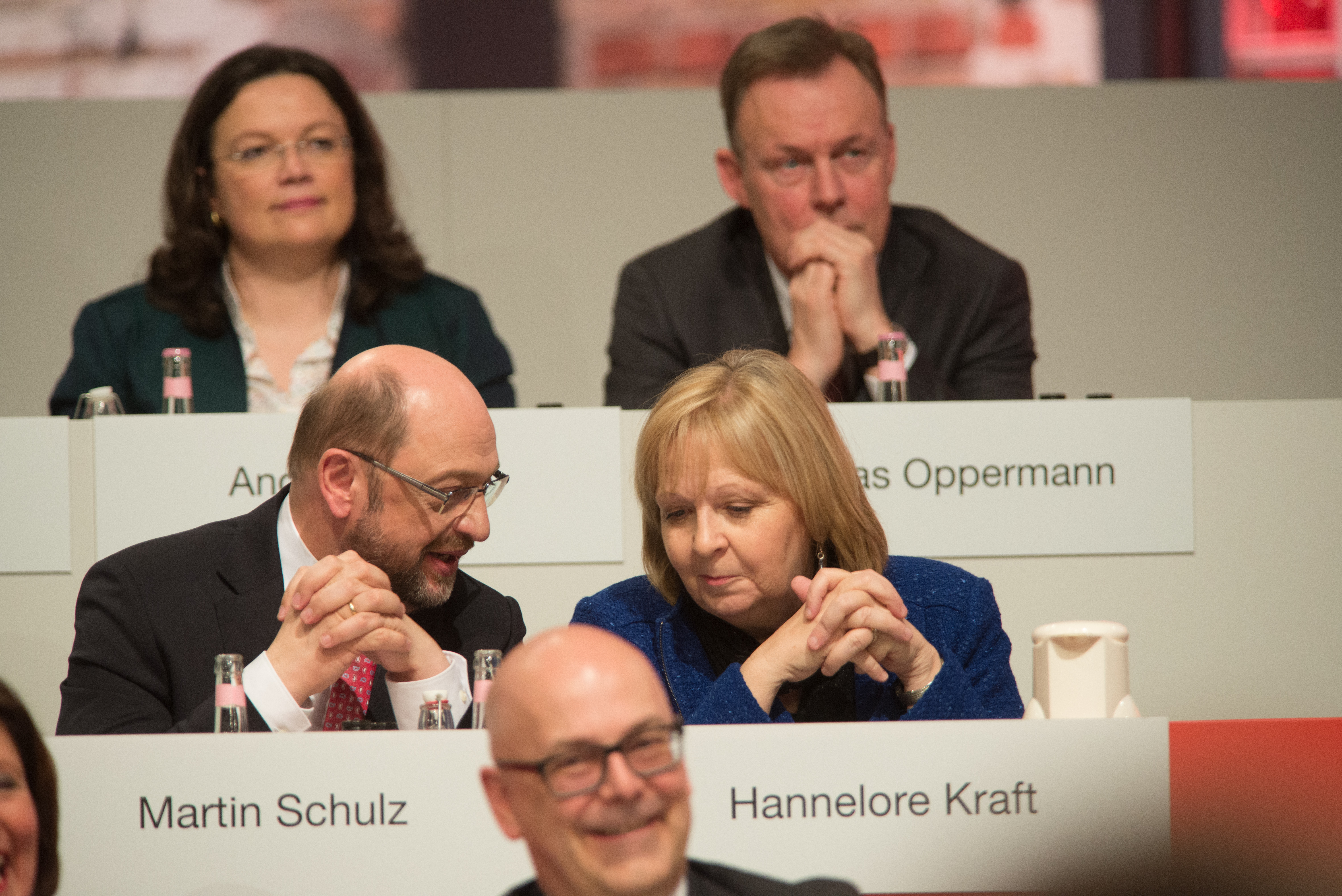 Hannelore Kraft auf dem SPD Bundesparteitag am 19. März 2017 in Berlin